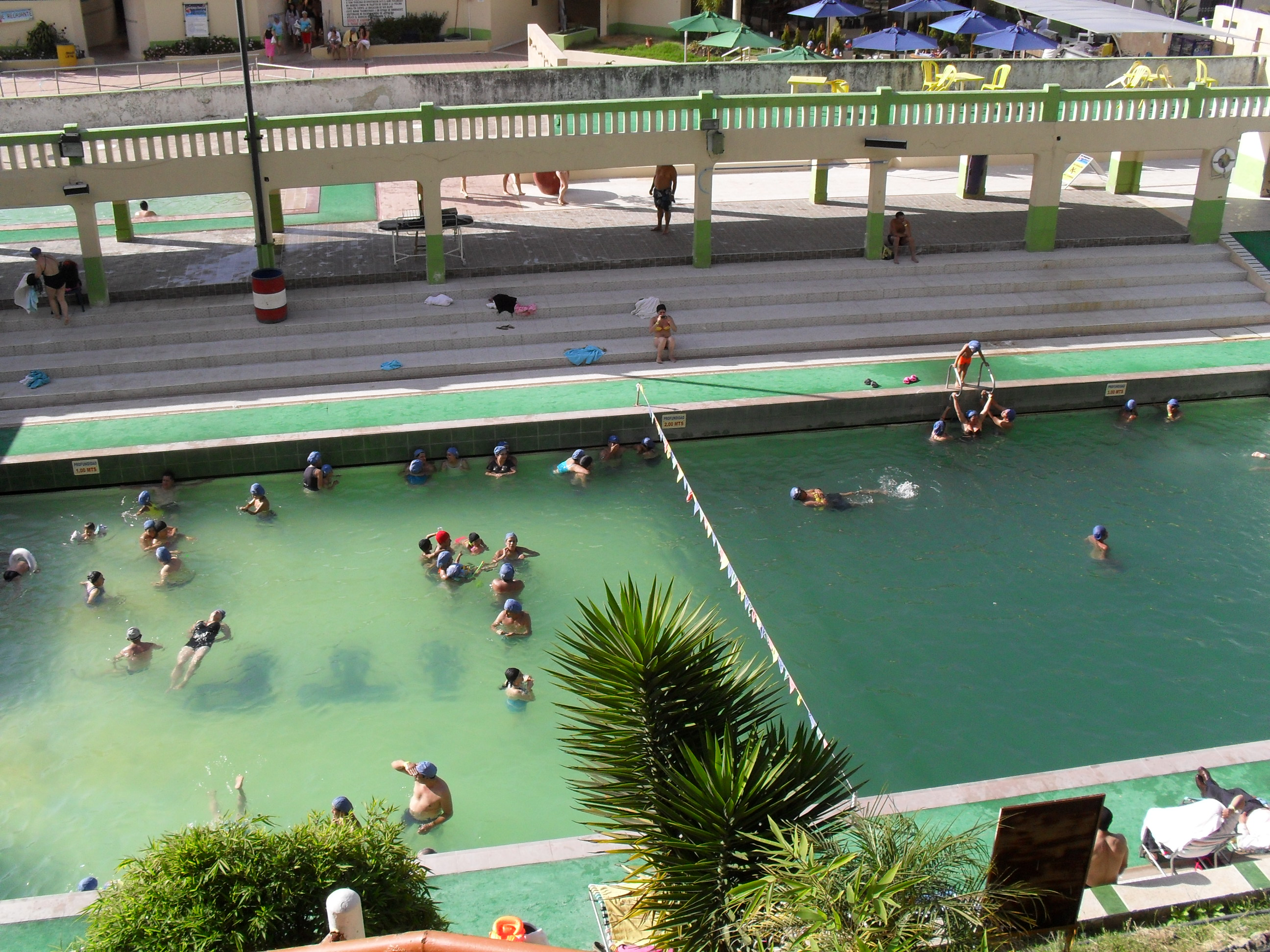 Piscinas termales en Paipa, Boyacá, Colombia